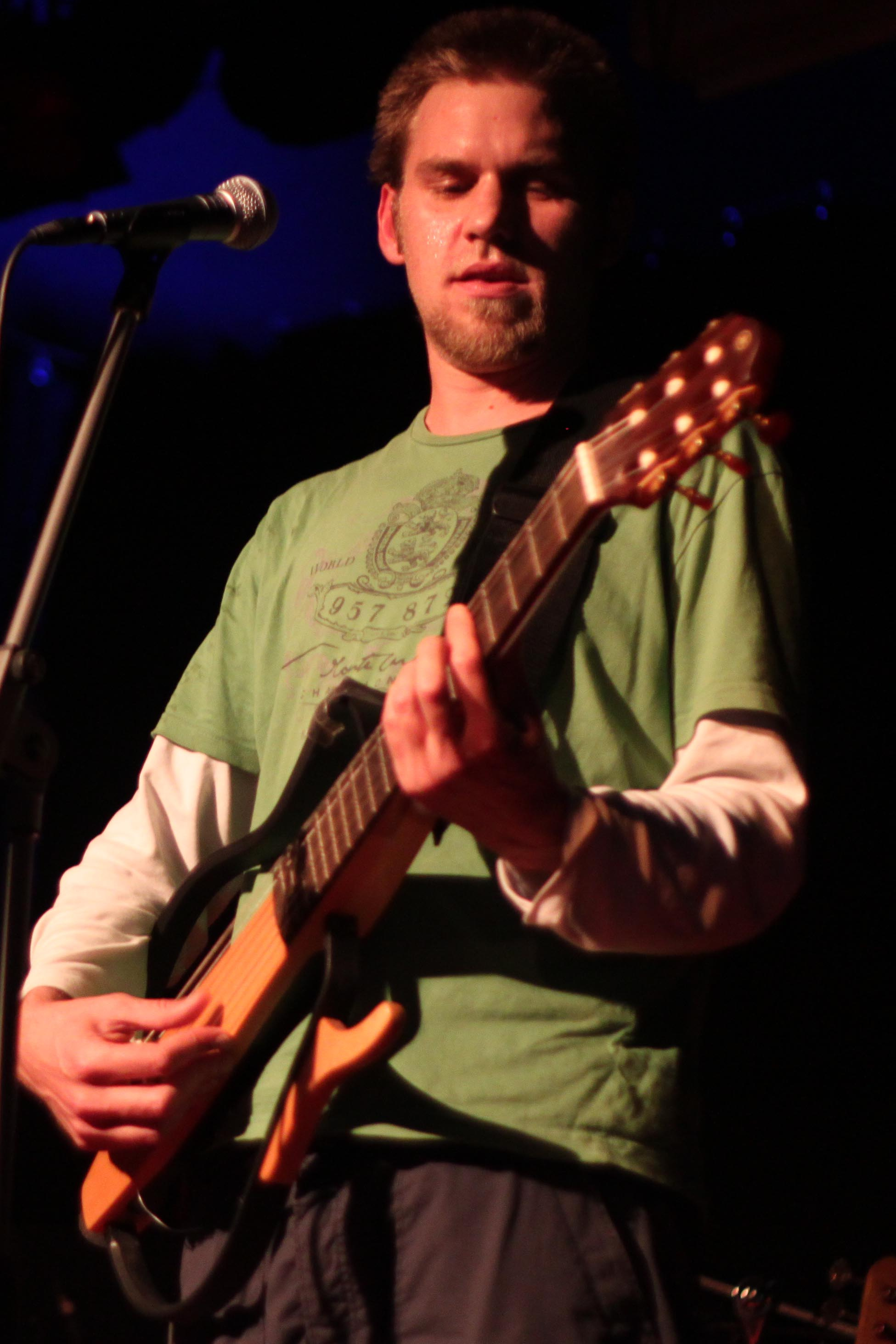 Jimi D. bei einem Konzert im Grazer p.p.c.